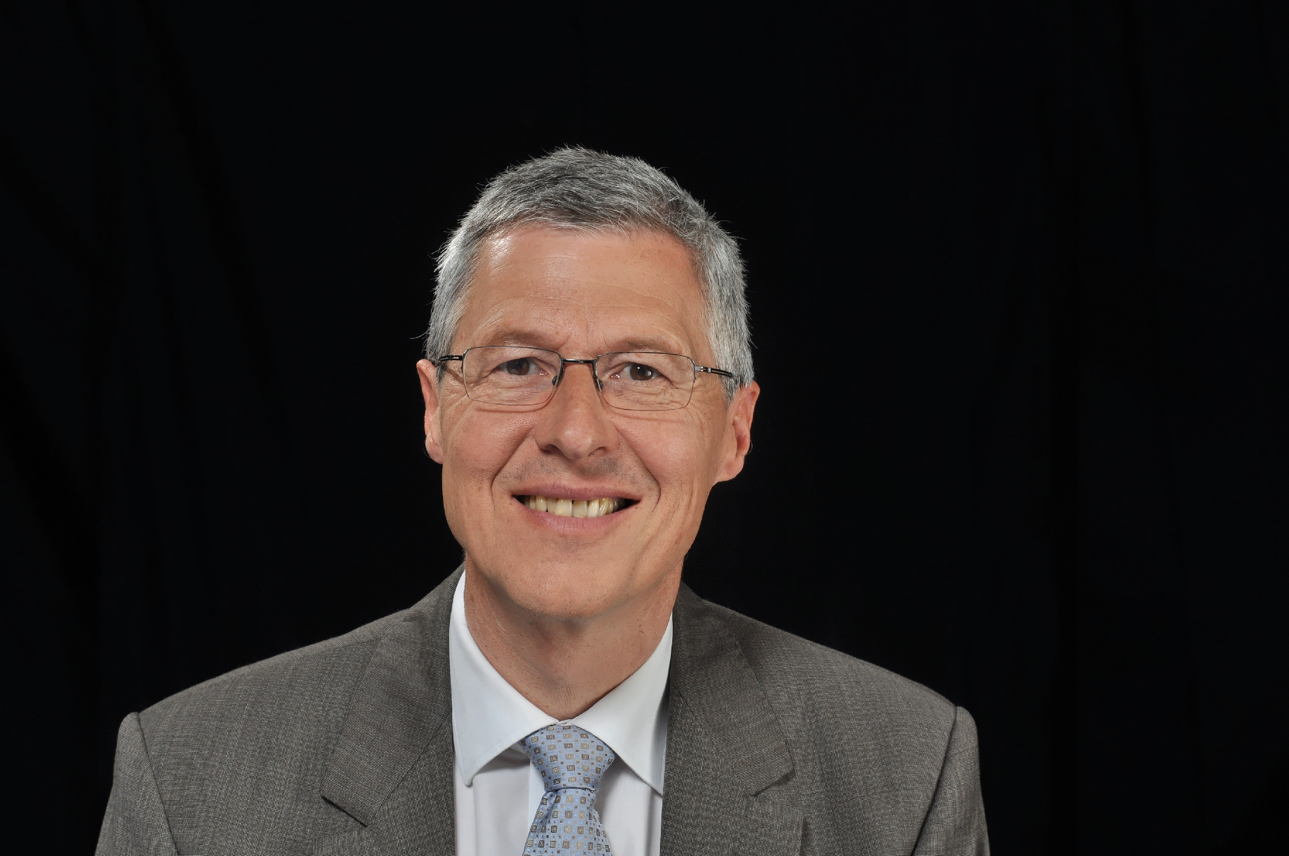 Stefan Scheffold 2013 Personality rights warning Although this work is freely licensed or in the public domain, the person(s) shown may have rights that legally restrict certain re-uses unless those depicted consent to such uses. In these cases, a model release or other evidence of consent could protect you from infringement claims.